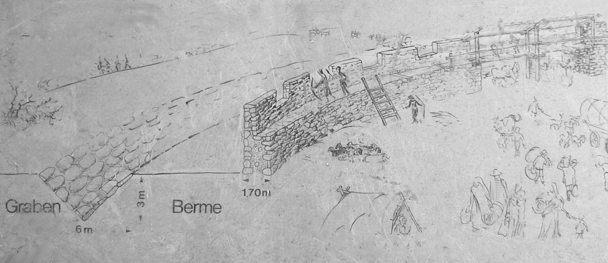 Rekonstruktion des Heisterschlösschen bei Beckedorf auf einer Tafel, aufgestellt an der Burgstelle